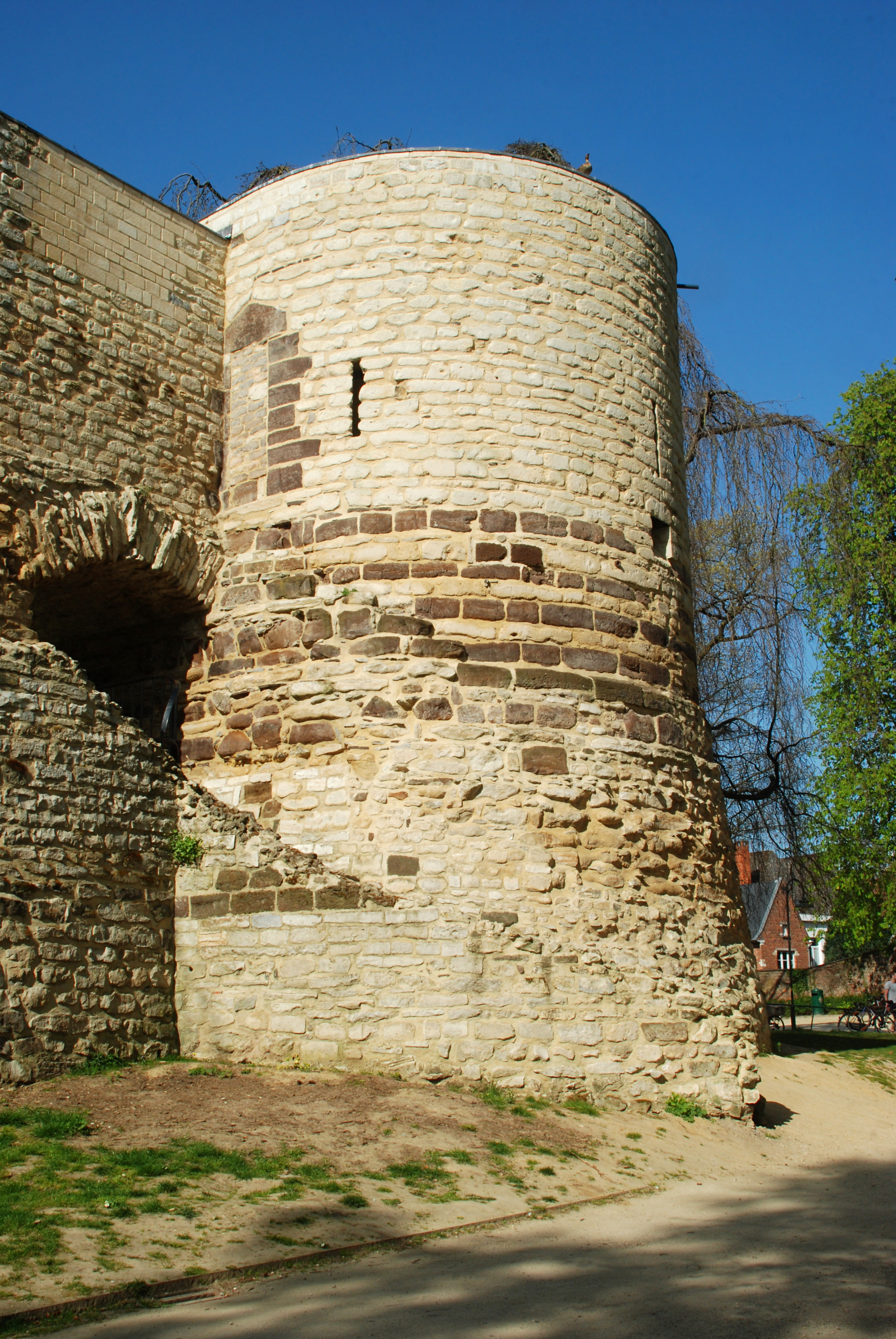 Belgique - Brabant flamand - Première enceinte de Louvain - Parc Saint-Donat - tour ouest